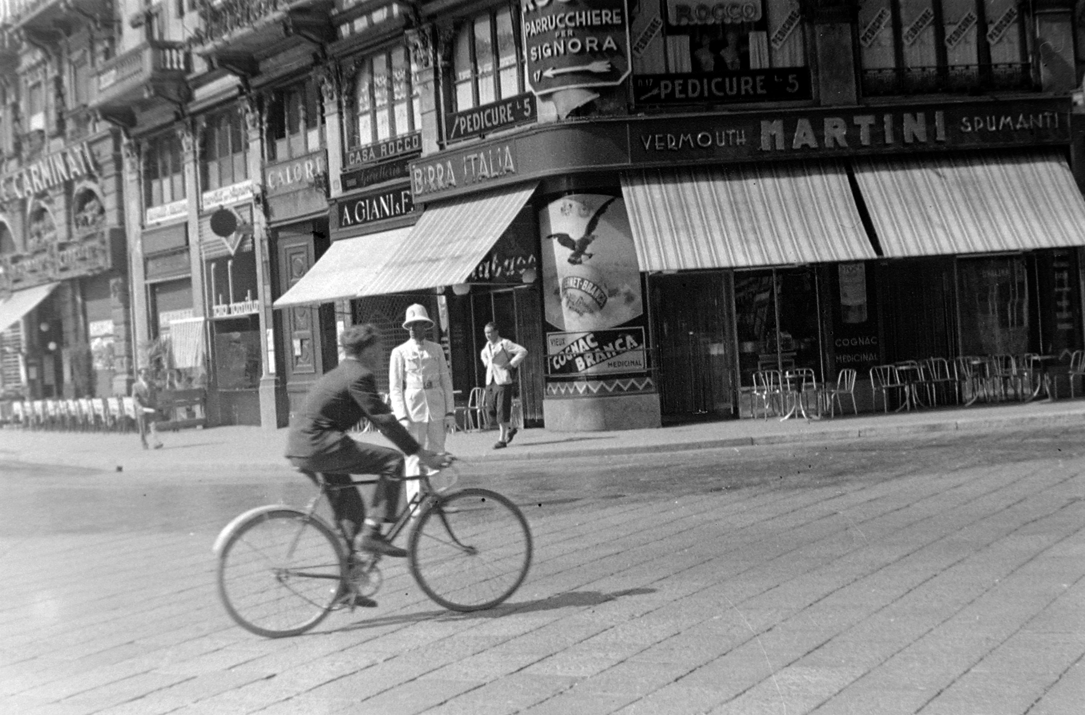 a Piazza del Duomo és a Piazza del Mercanti sarka. Location: Italy, Milan Tags: bicycle, cop Title: a Piazza del Duomo és a Piazza del Mercanti sarka.